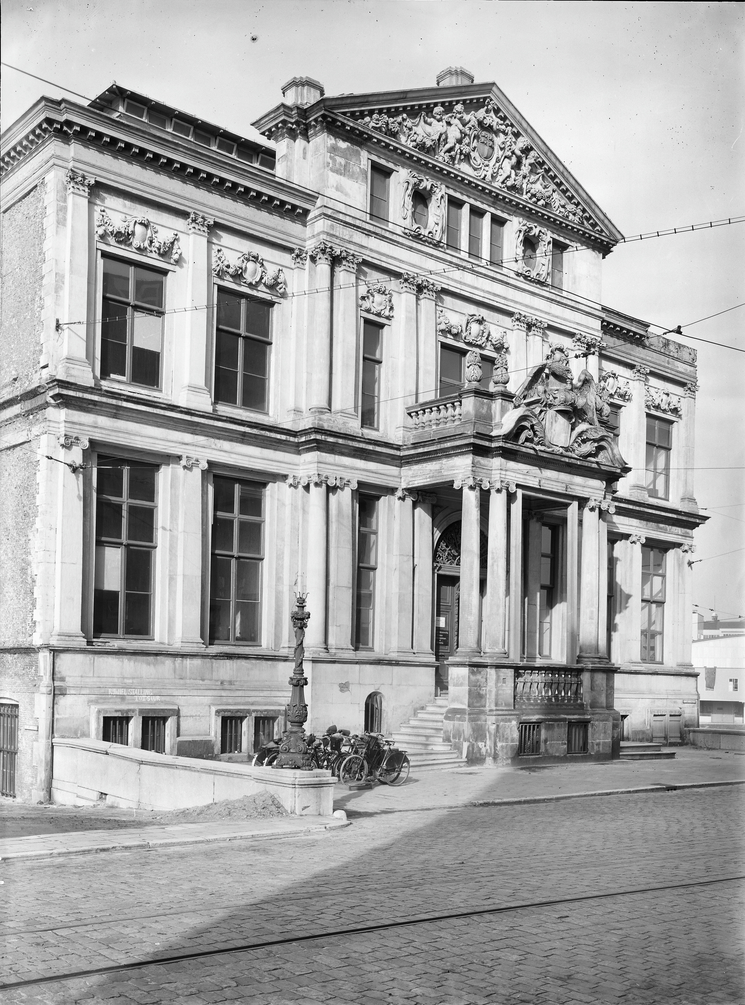 Schielandshuis Museum Boymans: exterieur